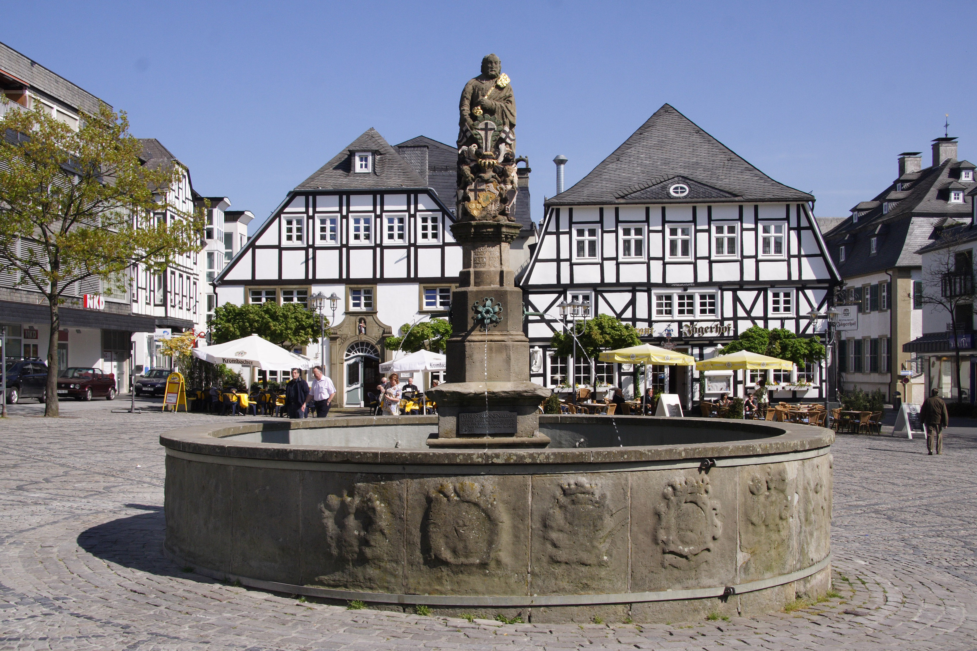 Der Petrusbrunnen, genannt Kump, auf dem Marktplatz von Brilon. This image shows a heritage building in Germany, located in the North Rhine-Westphalian city Brilon.